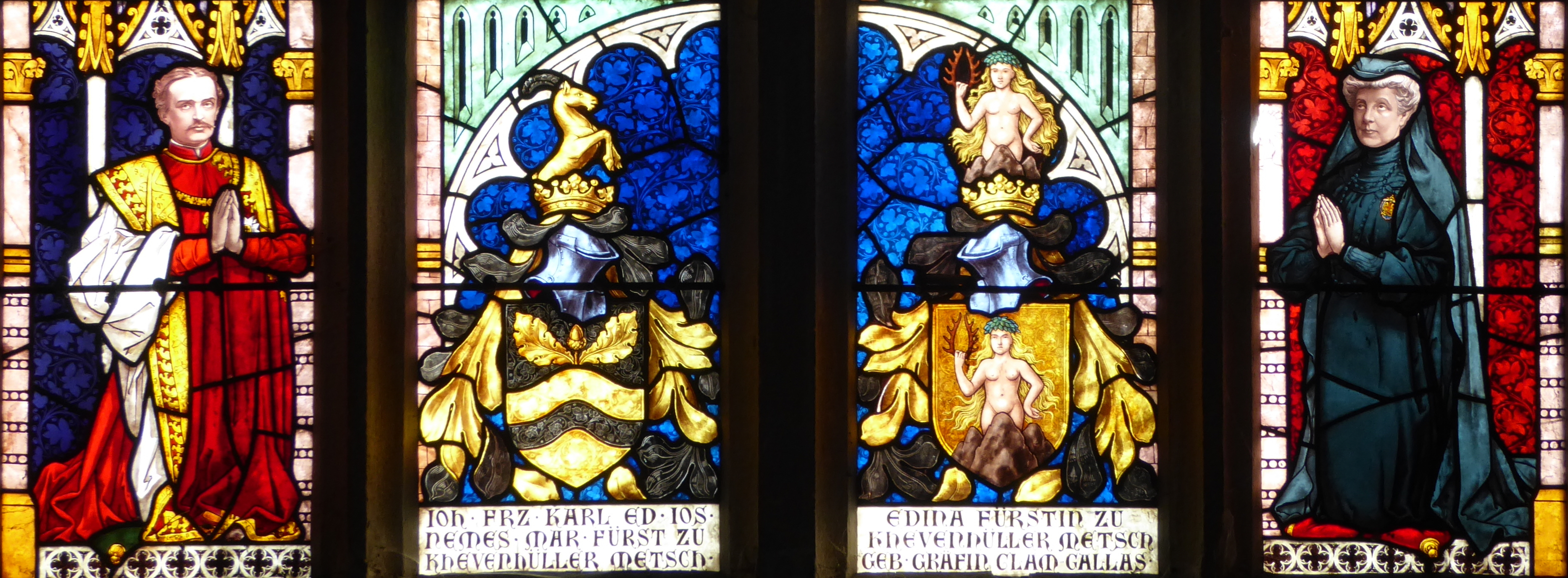 Burgkapelle, Hardegg, Niederösterreich - Maßwerkfenster mit Stifterpaar Johann Carl Khevenhüller und Edina, geb. Clam-Gallas mit den jeweiligen Wappen